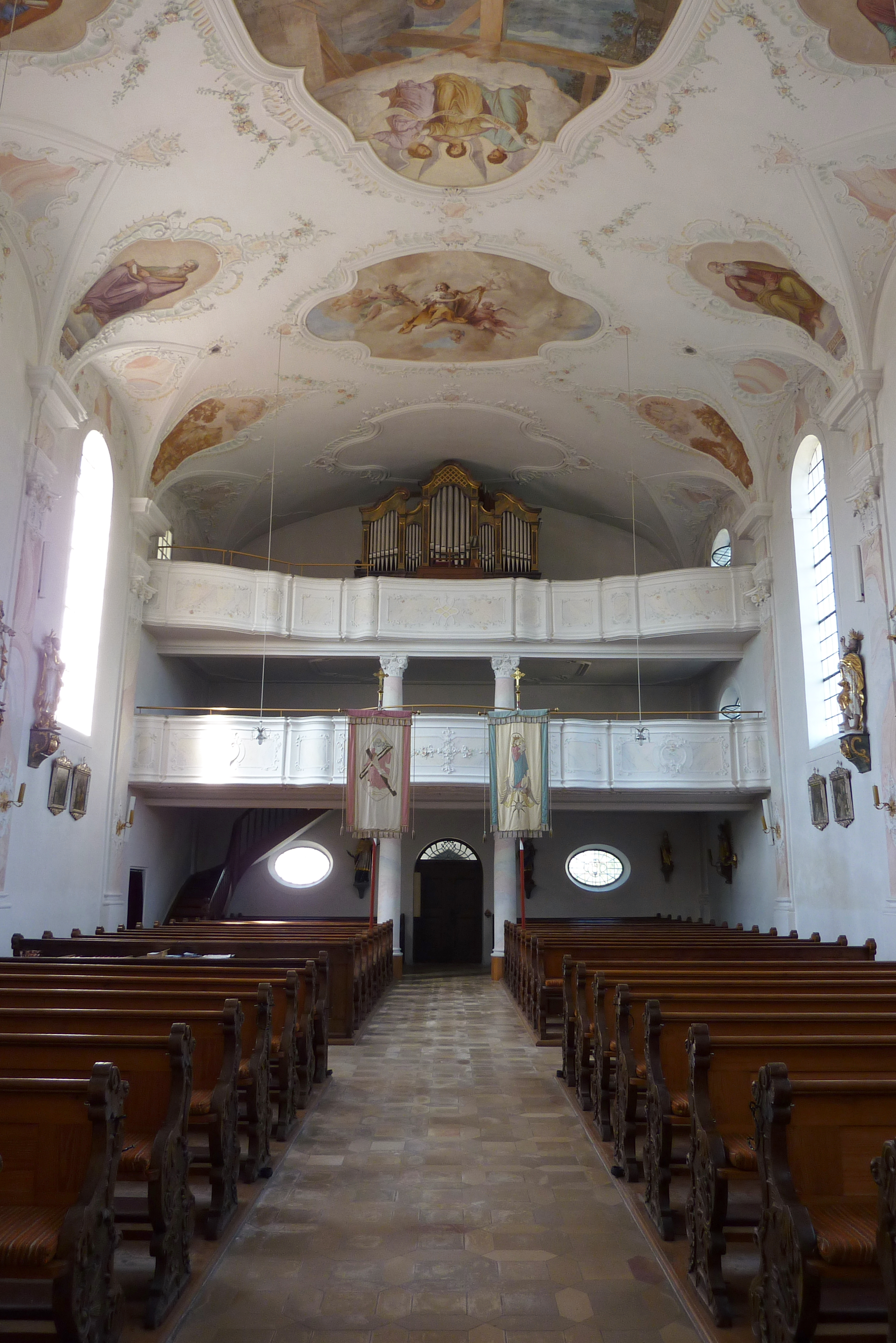 Katholische Pfarrkirche St. Blasius in Fristingen, einem Stadtteil von Dillingen an der Donau im Landkreis Dillingen an der Donau (Bayern), Innenraum mit Blick zur Orgelempore